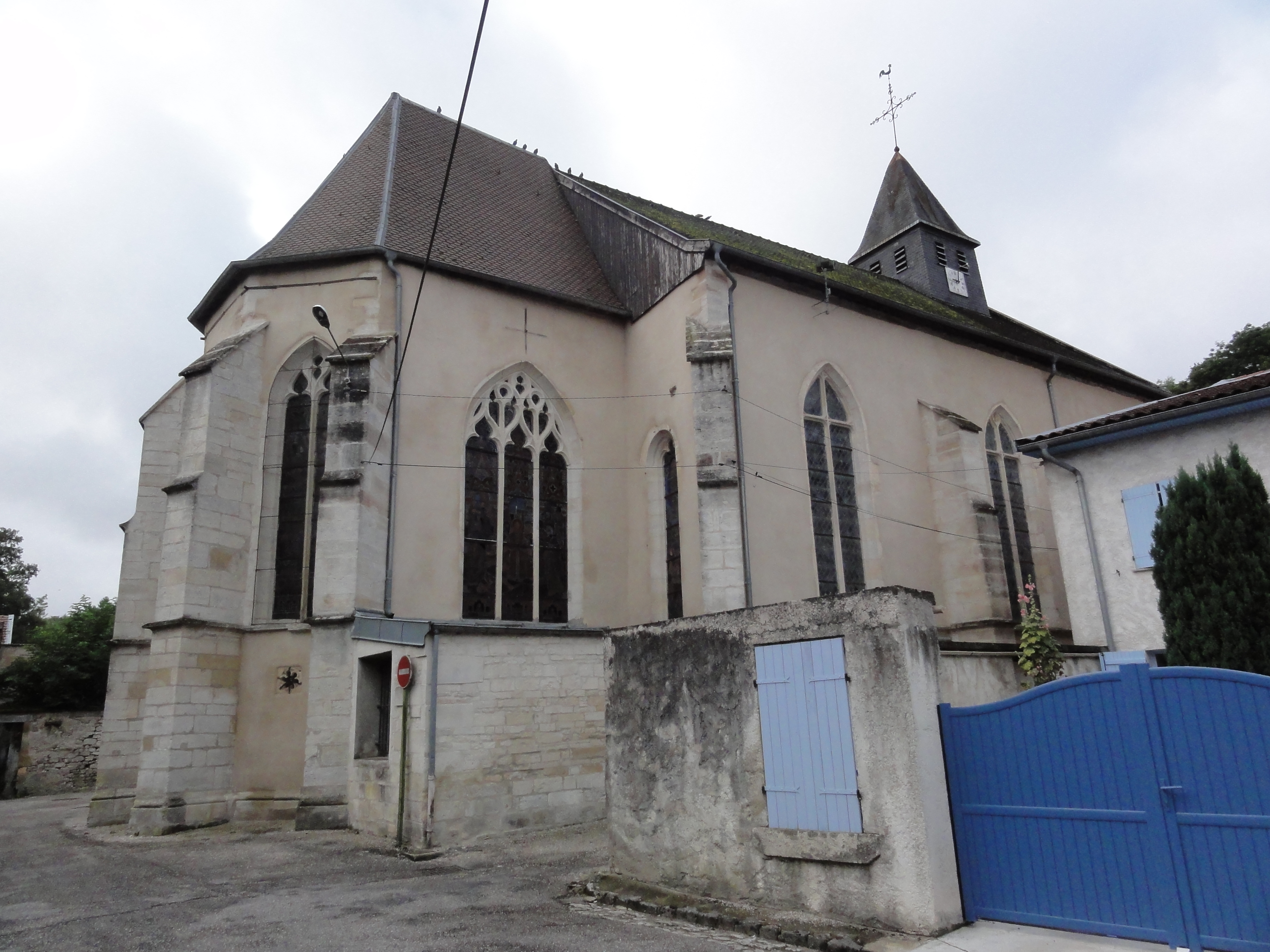 Église Saint-Calixte de Savonnières-devant-Bar